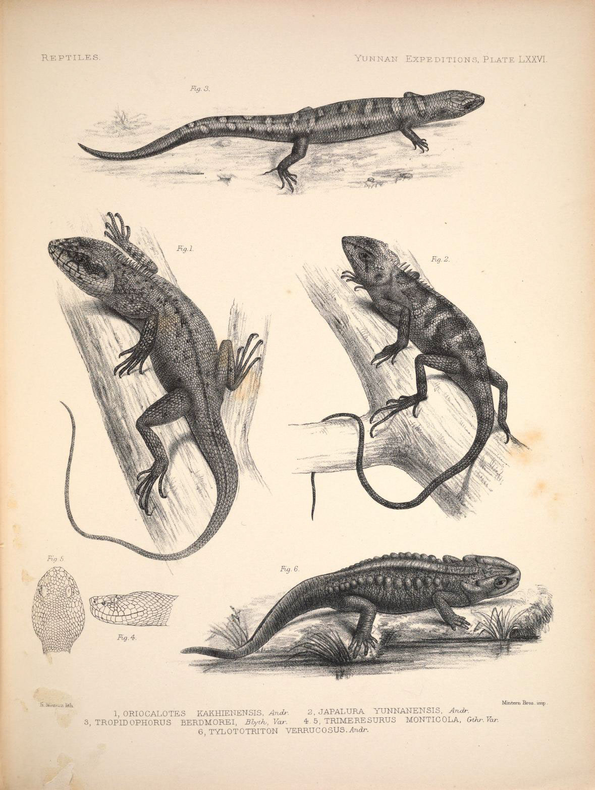 1. Oriocalotes kakhienensis = Pseudocalotes kakhienensis 2. Japalura yunnanensis = Japalura yunnanensis 3. Tropidophorus berdmorei = Tropidophorus berdmorei 4, 5. Trimeresurus monticola = Ovophis monticola 6. Tylototriton verrucosus = Tylototriton verrucosus